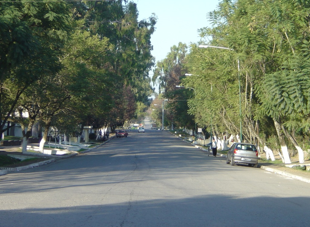 Avenida San Martín, San Pablo, Departamento Lules (Tucumán)